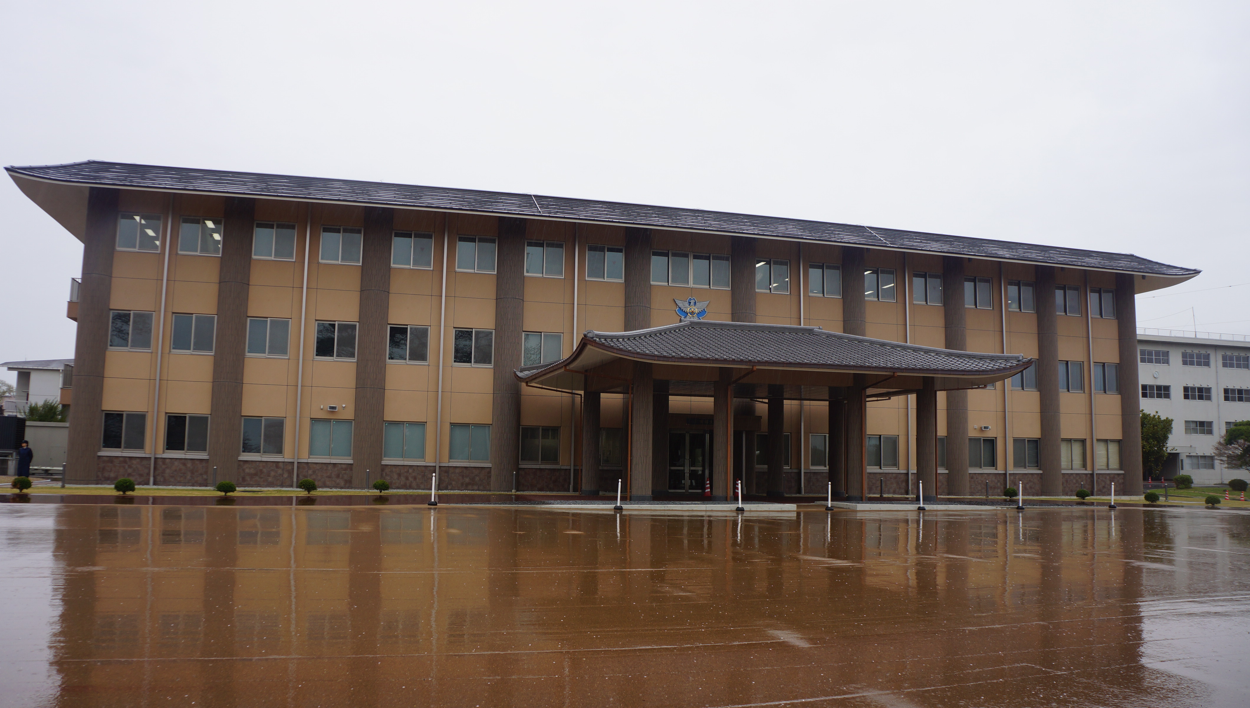 航空自衛隊 奈良基地。 13年4月6日撮影。